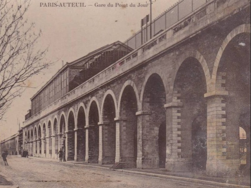 Gare du Point du Jour (Paris - 16e) - Ligne d'Auteuil